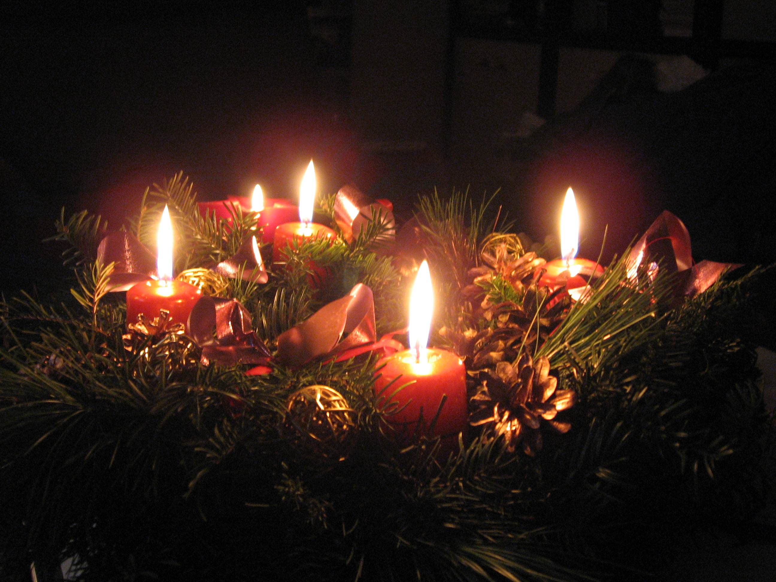 Adventný veniec